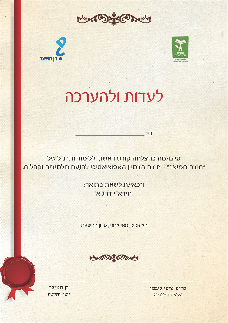 תעודת גמר לקורס החידות